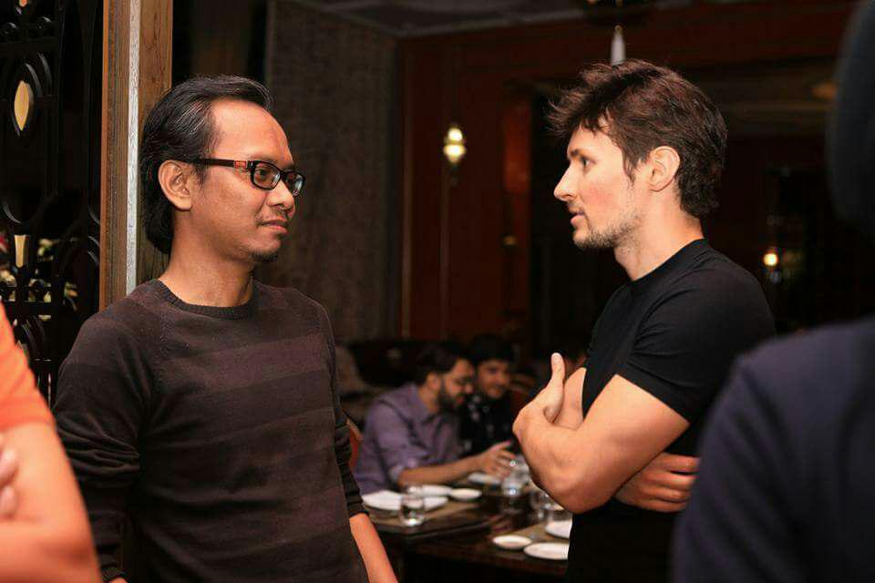 Jim Geovedi & Pavel Durov 1 Agustus 2017